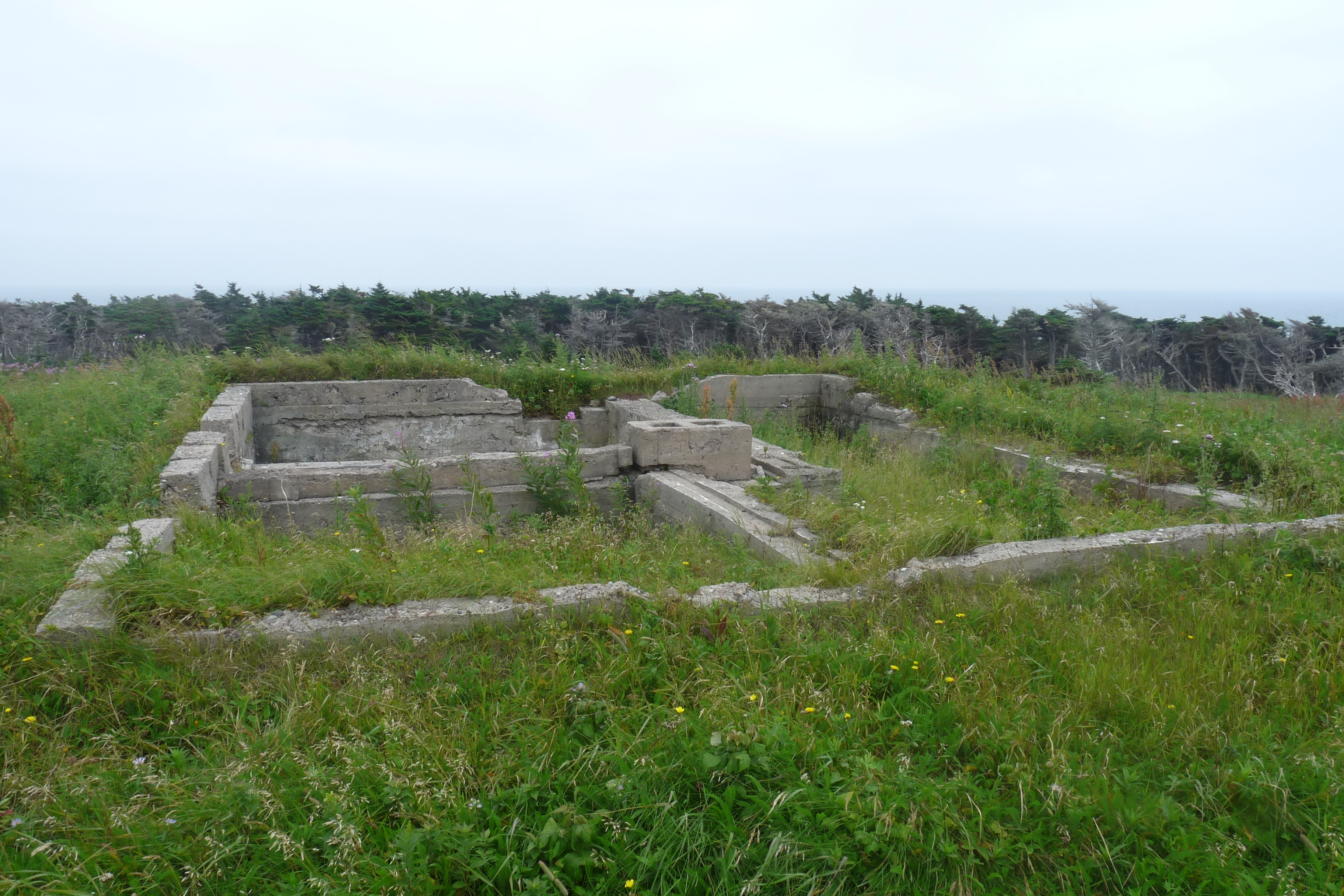 Vestige des fondations de la maison du gardien du phare de l'ile Brion